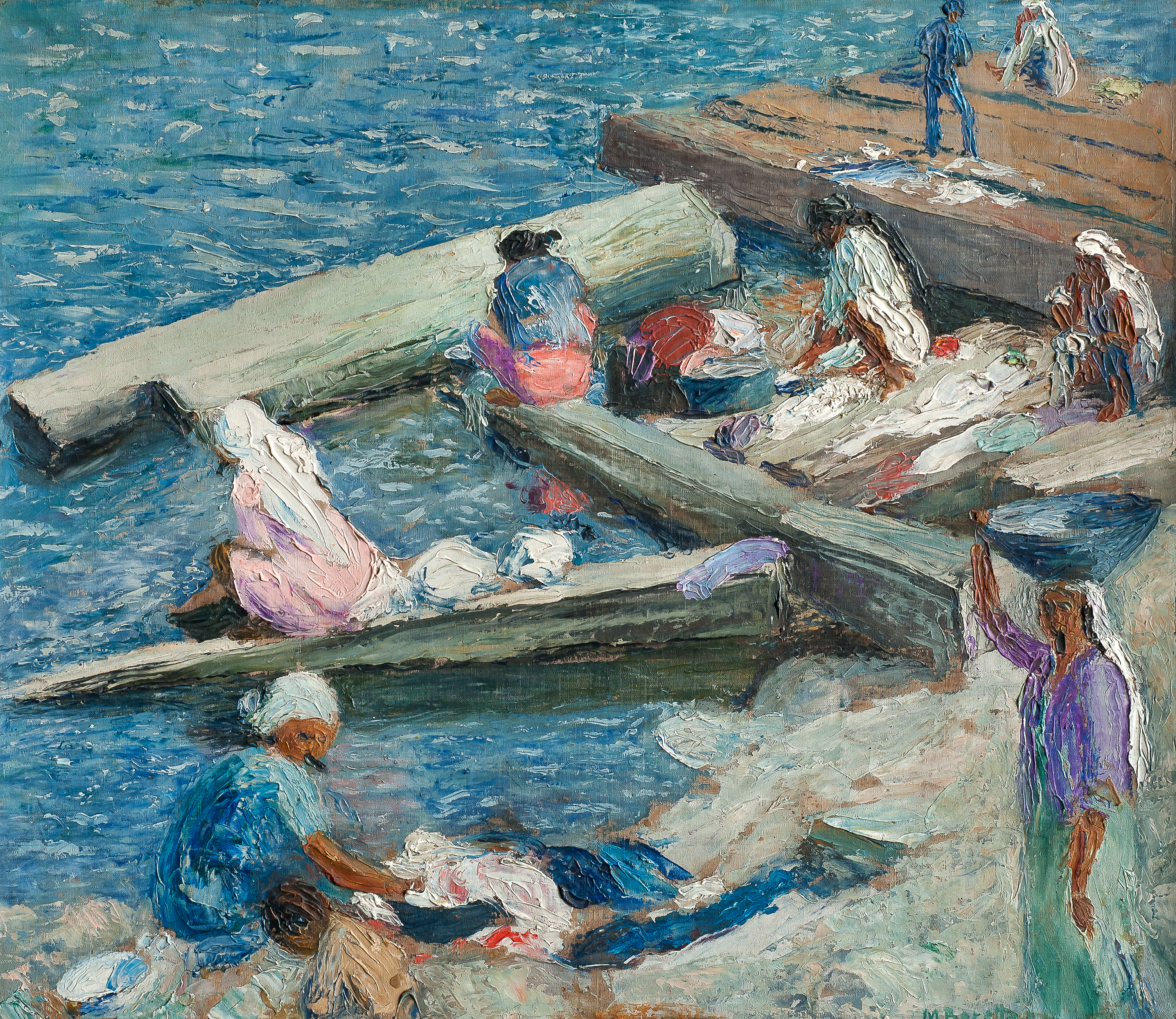 Obra "Las Lavanderas en el Paraguay" del pintor uruguayo Milo Beretta (1875-1935) Óleo sobre tela de 49 cm de alto x 57,5 cm de ancho. Fotografía de la obra tomada por Carly Angensheidt.